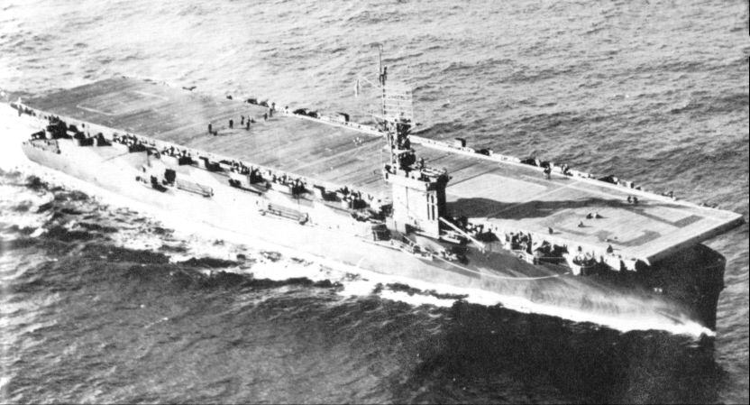 Gambier Bay (CVE-73) underway, US Navy photo img url